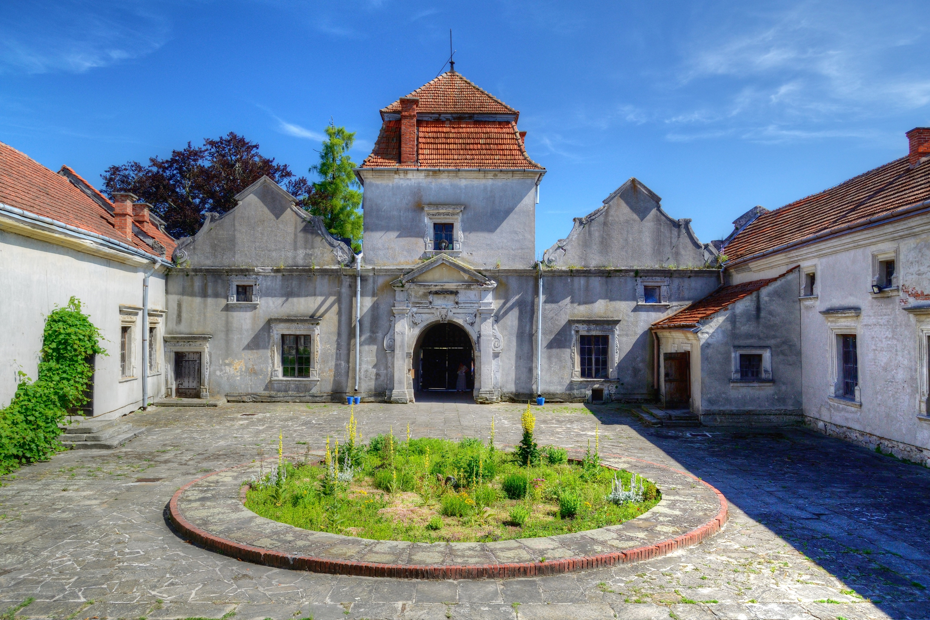 Вид на вїздну браму